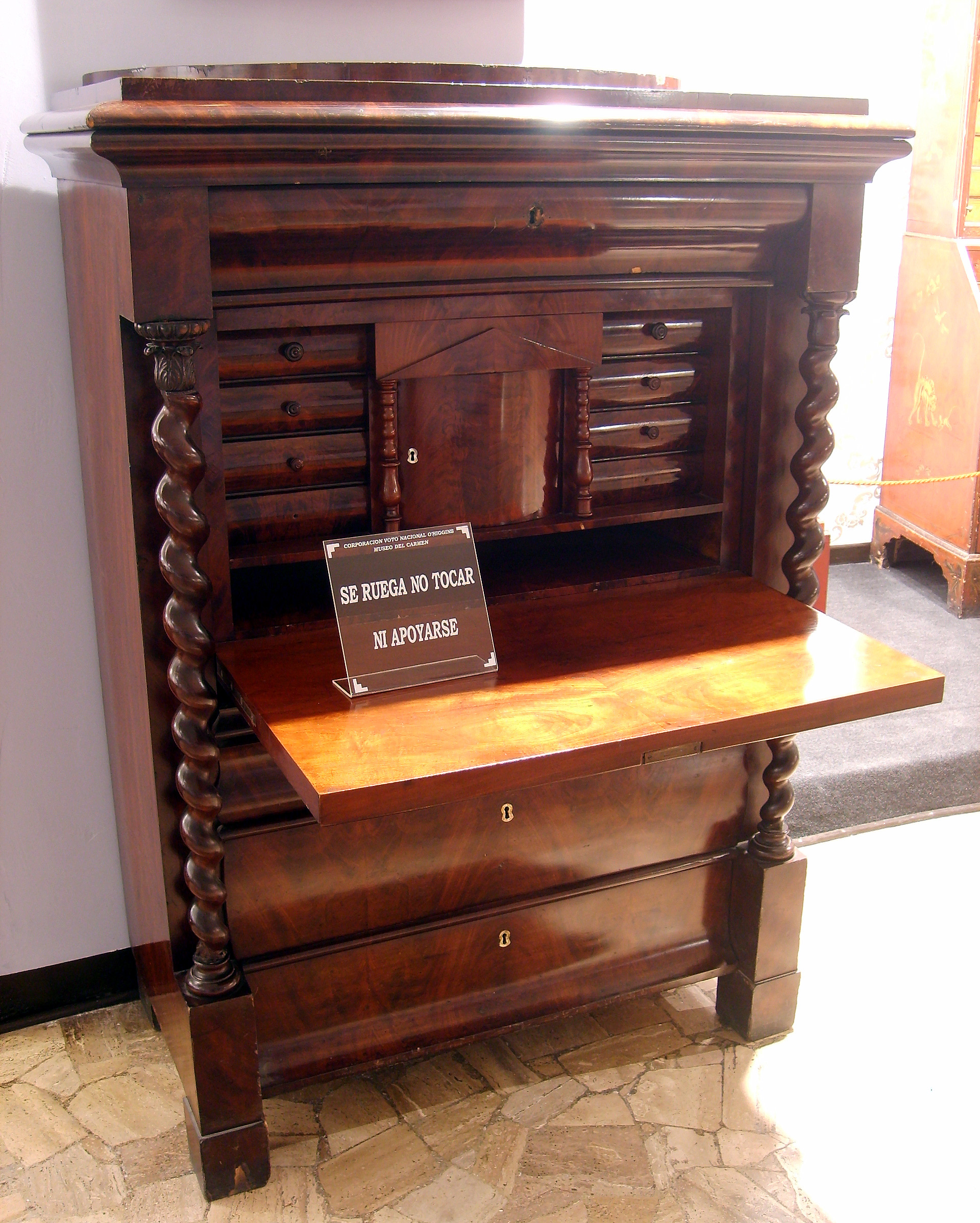 Chiffonier-escritorio hecho con madera de caoba. Siglo XIX. Perteneció al Canónigo Taforó. Legado de Elías García-Huidobro. Forma parte de la colección del Museo del Carmen de Maipú, en Santiago de Chile.